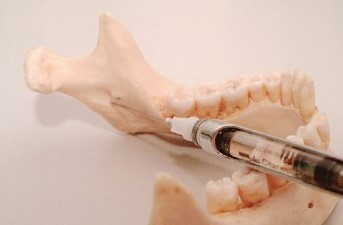 Técnica anestésica na odontologia utilizada para inibir todo o trajeto do N. Mandibular na mandíbula